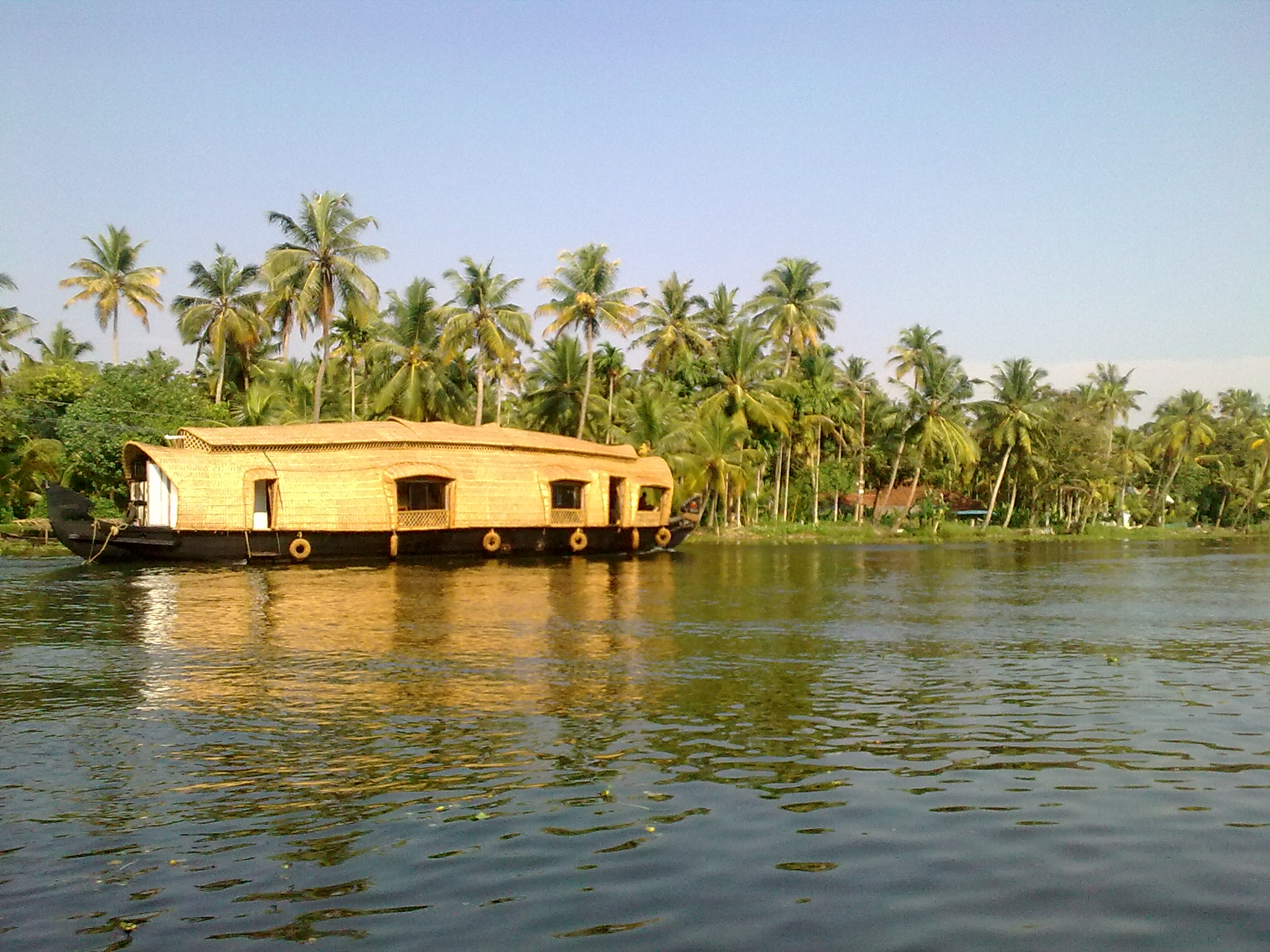 കേരളത്തിലെ ആലപ്പുഴ - കായല്‍പ്പുറം - നെടുമുടി ബോട്ടുയാത്രക്കിടെ പകര്‍ത്തിയ ദൃശ്യങ്ങള്‍